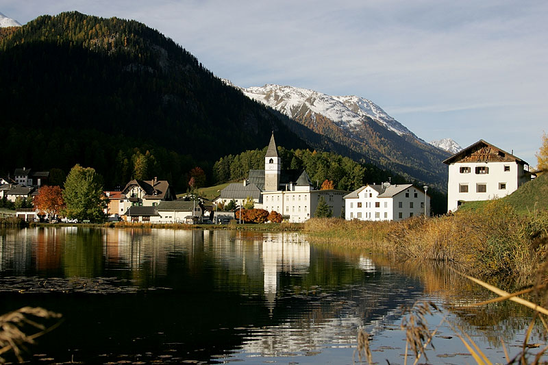 Tarasp im Morgenlicht